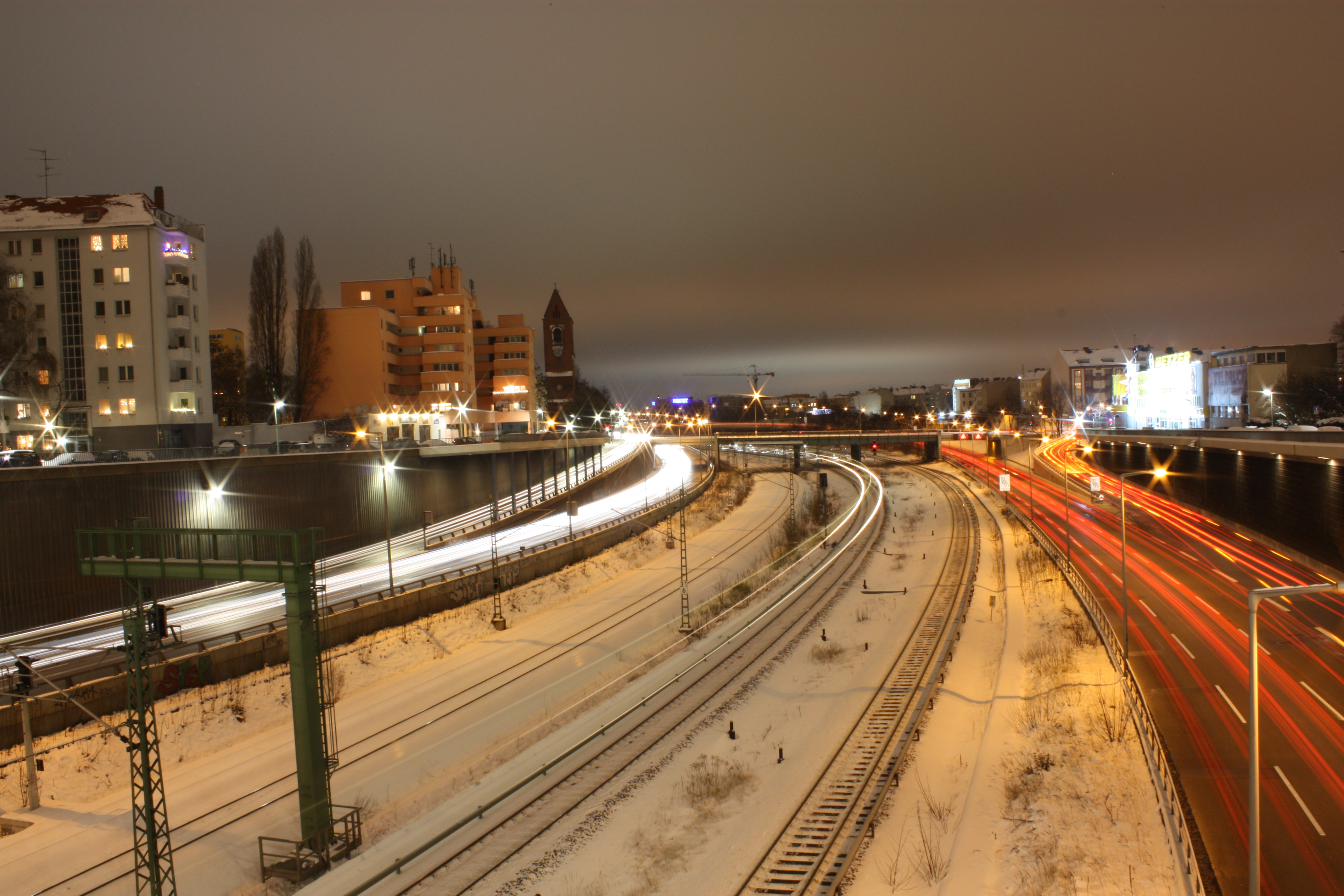 A100 vom Kaiserdamm bei Nacht in Richtung Norden